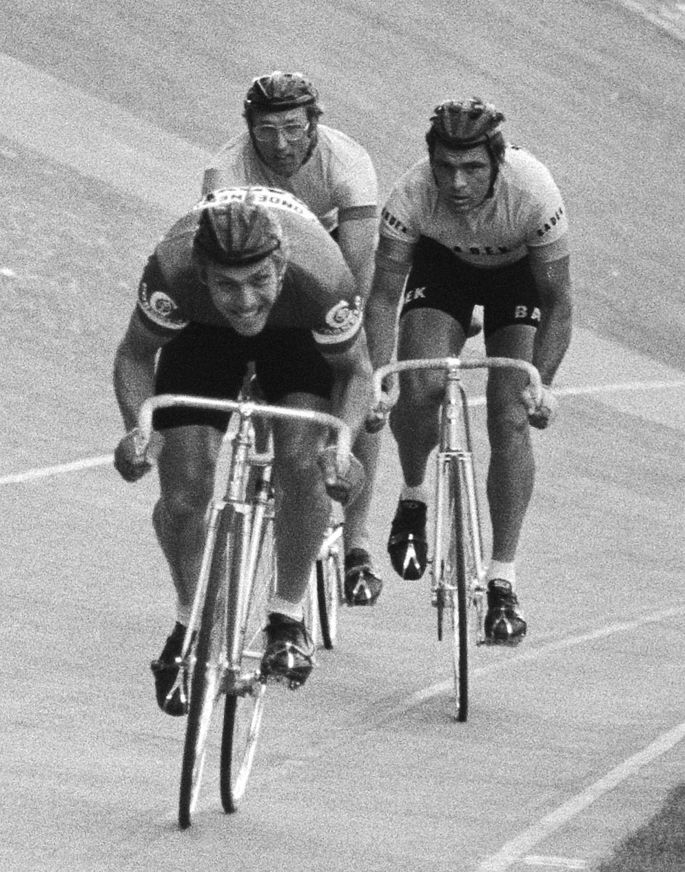 Nederlandse wielerkampioenschappen op de baan in Utrecht; sprint professionals; Huisjes wint voor Van der Touw en De Wilde